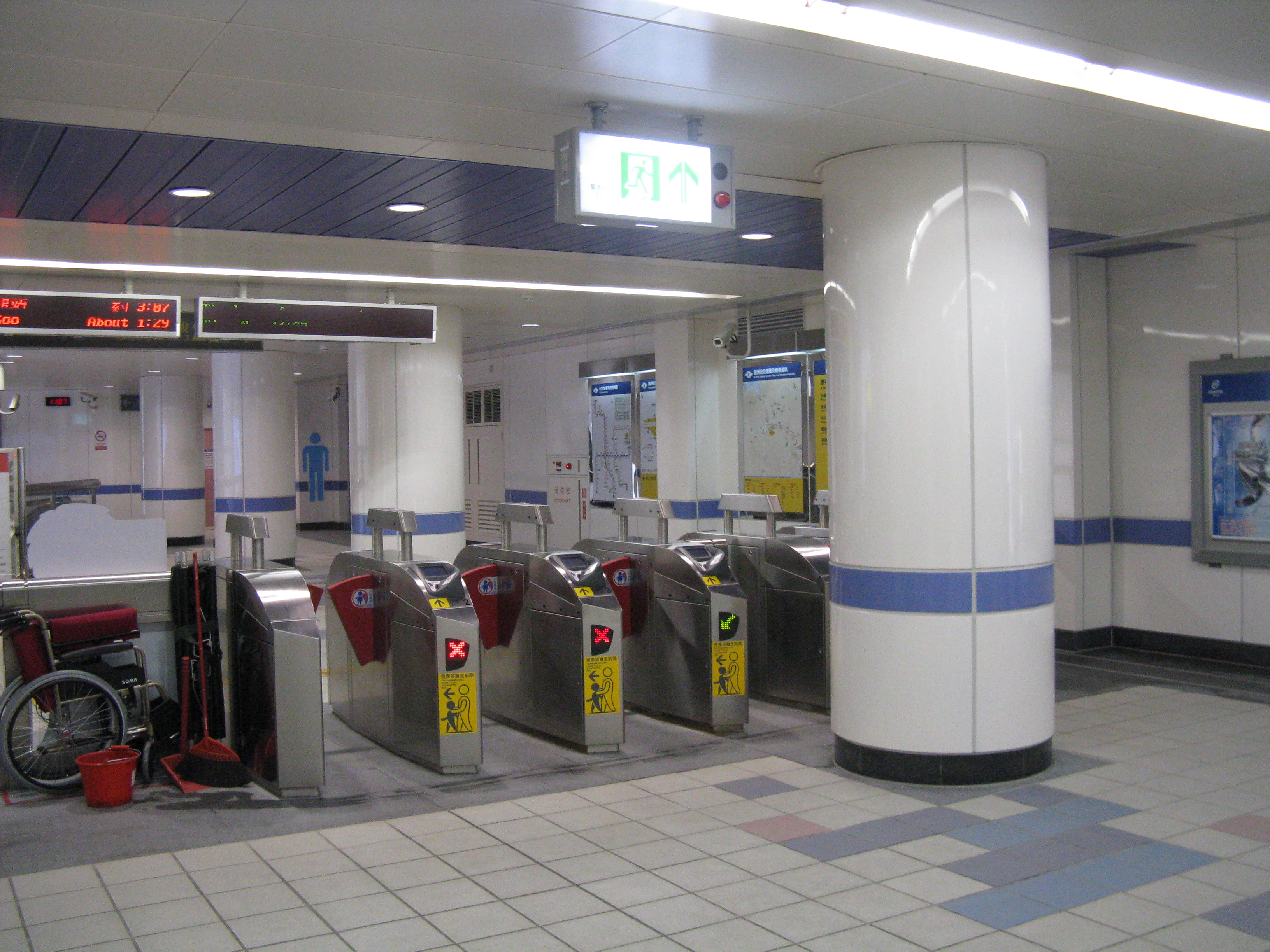 台北捷運内湖線葫洲駅南コンコース改札口。